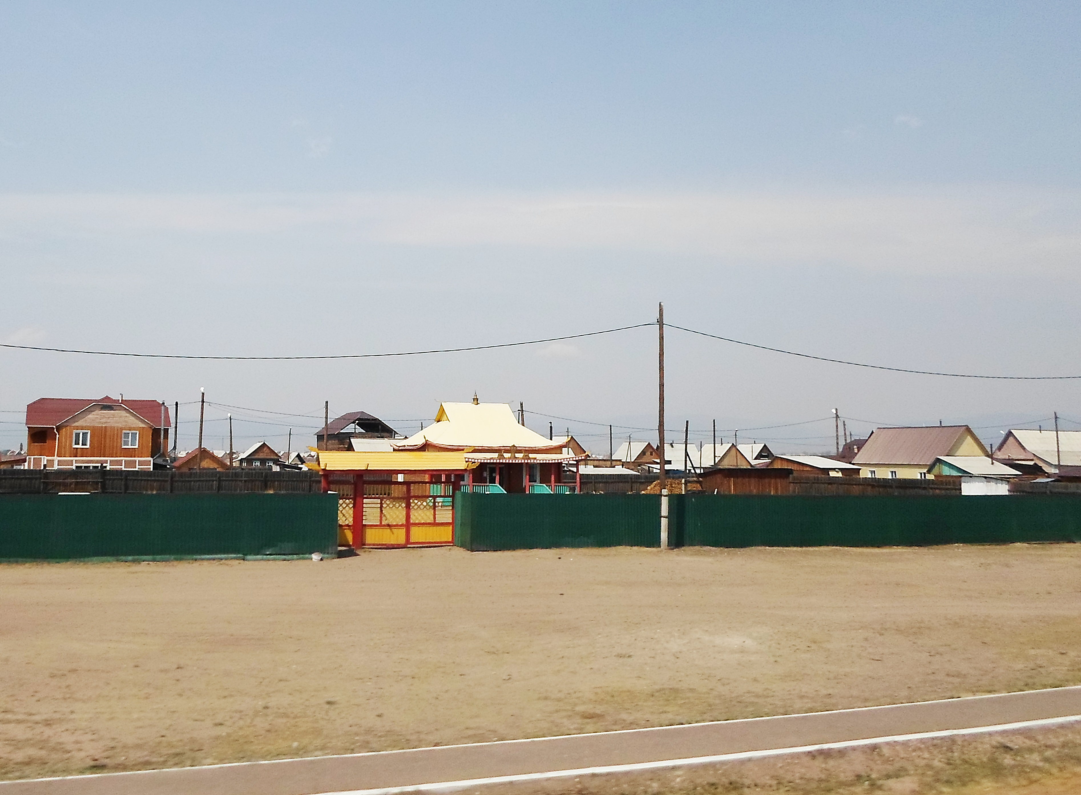 Буддийский храм-дуган в Нур-Селении.